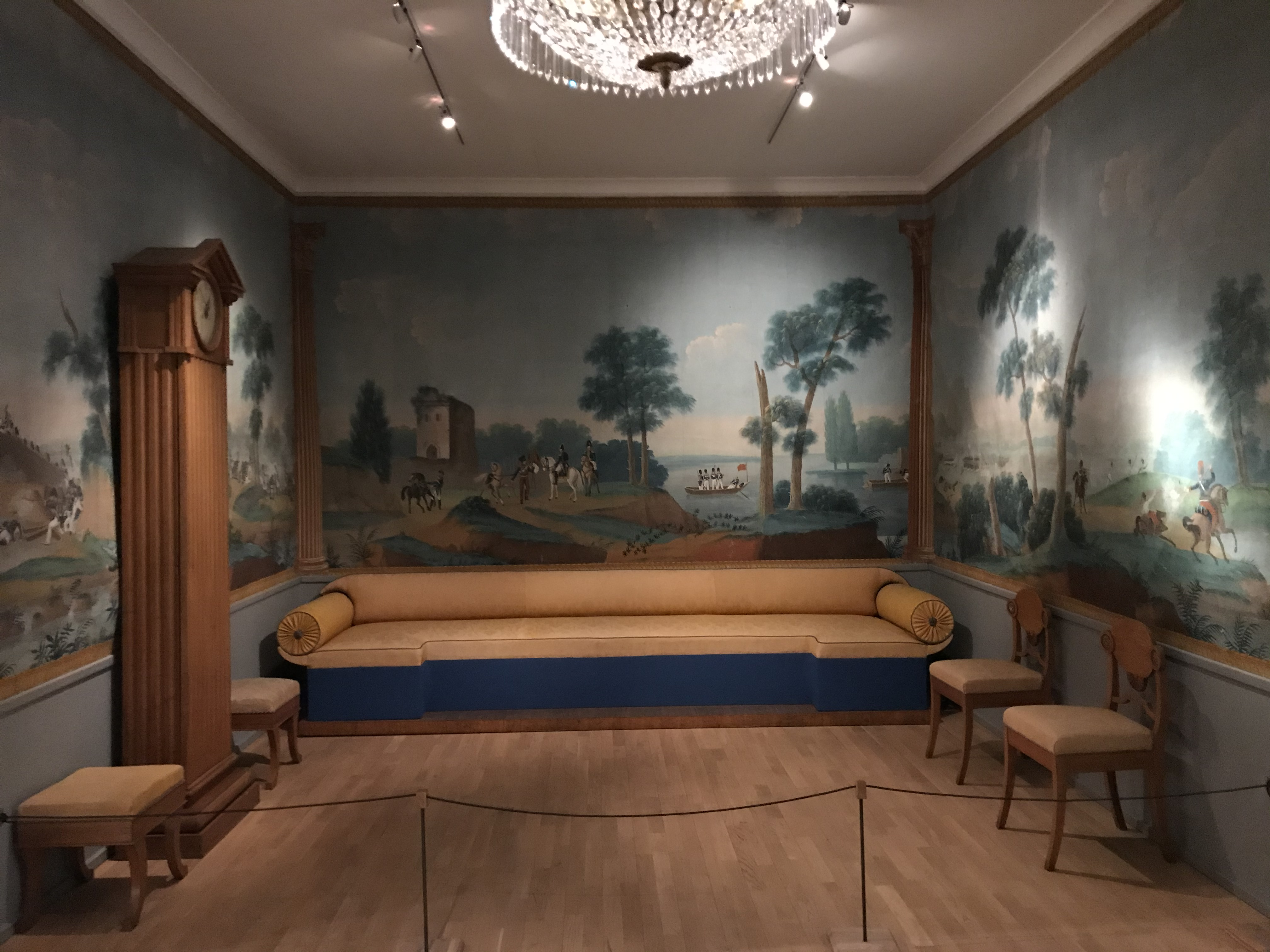 Länsmuseet Gävleborg, Brynässalongen